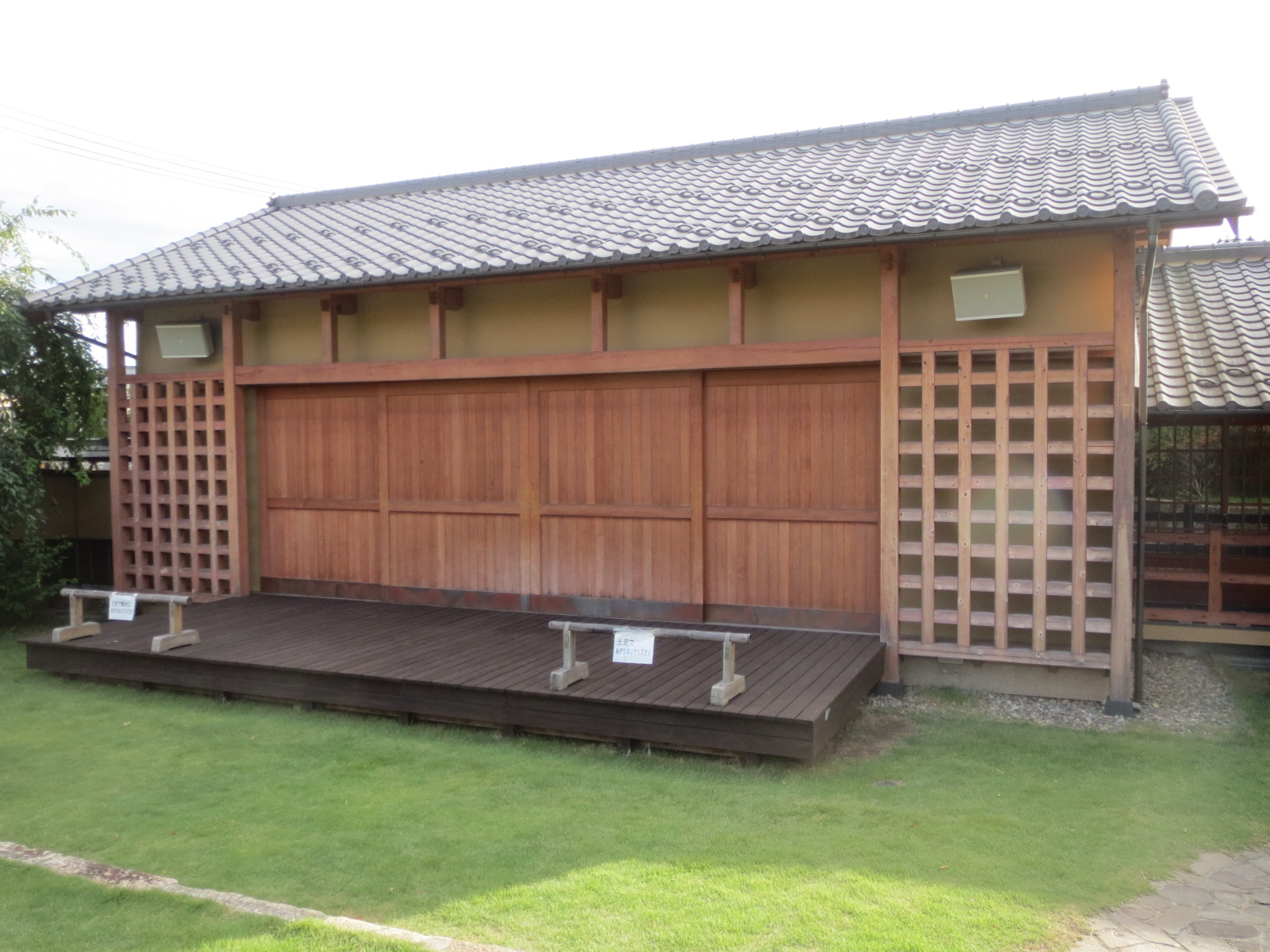 福島市にある旧堀切邸下蔵